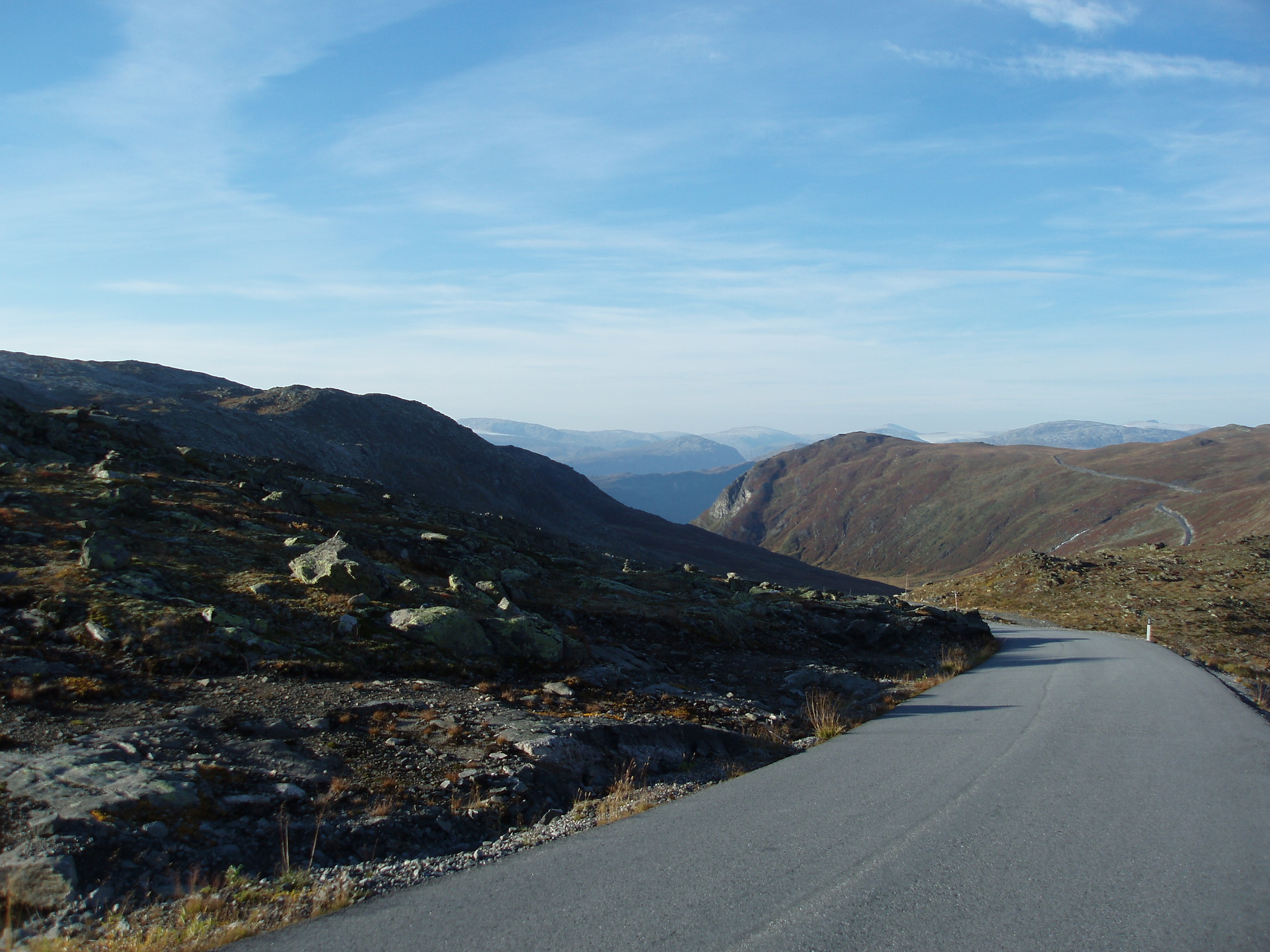 Tindevegen